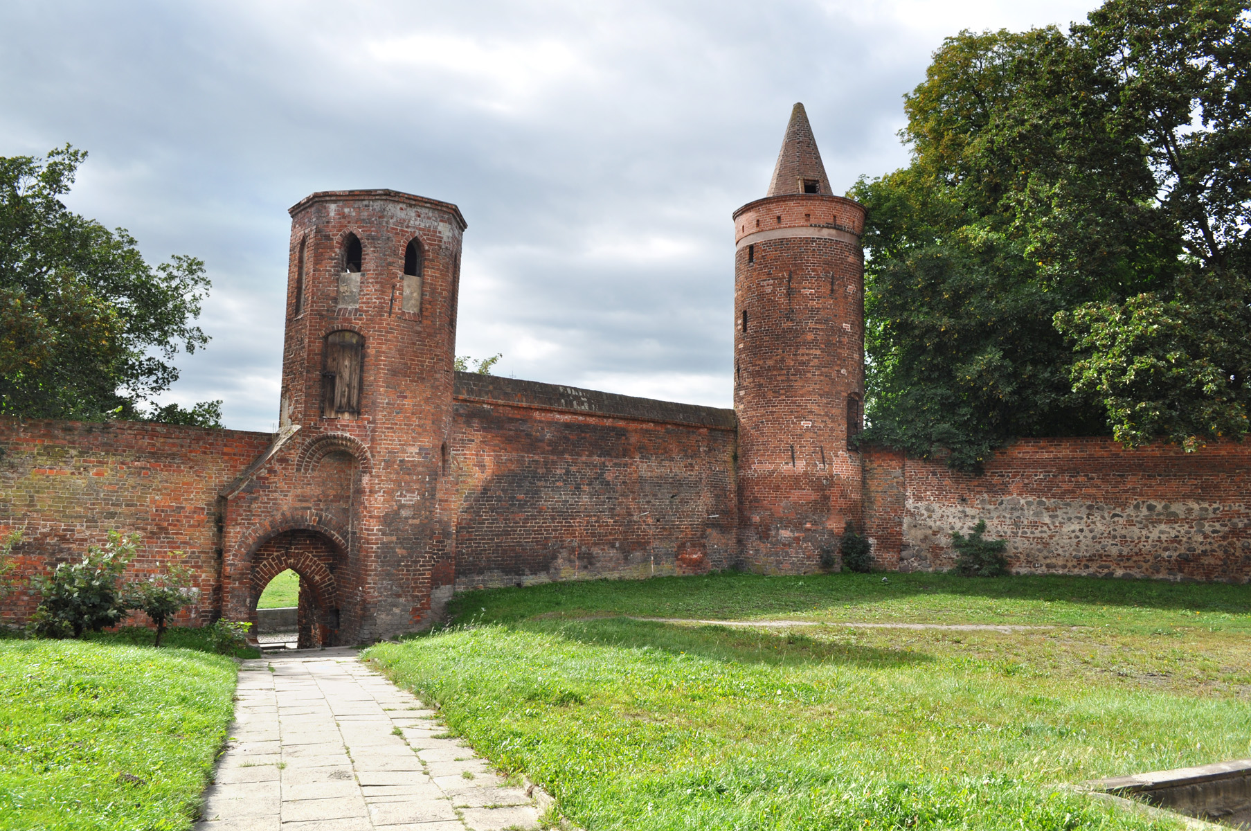 Mury obronne z wieżami Menniczą i Prochową w Goleniowie